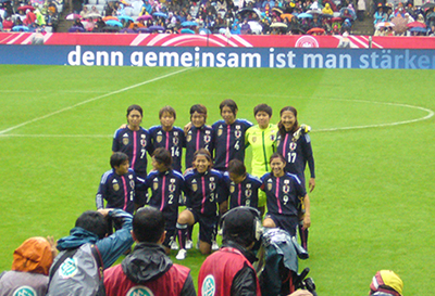 Germany vs Japan